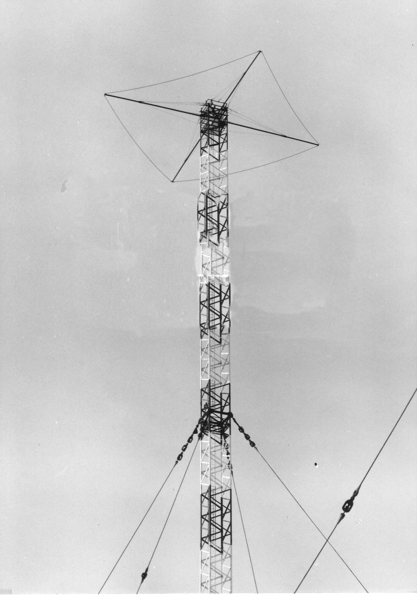 Antennmast vid Göteborg Rundradiostation i Järnbrott.